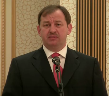 Victor Șelin / Виктор Шелин